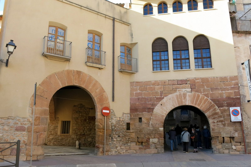 portal de la Saura, a Alcover comarca de l'Alt Camp - Catalunya